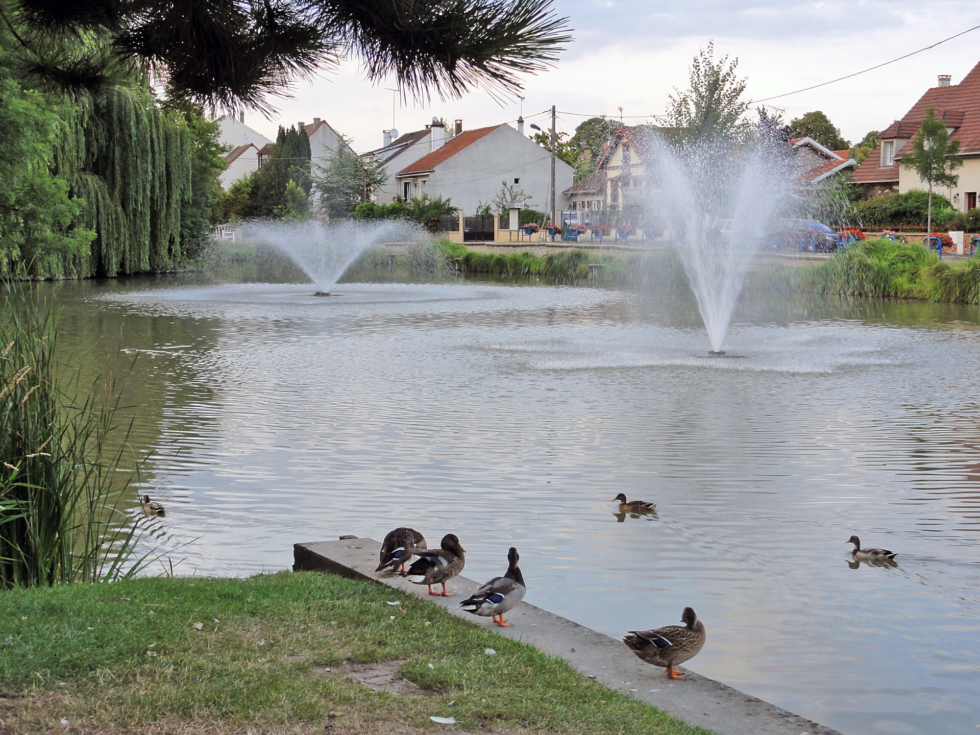 Le lac du Thillay, Val-d'Oise, France.